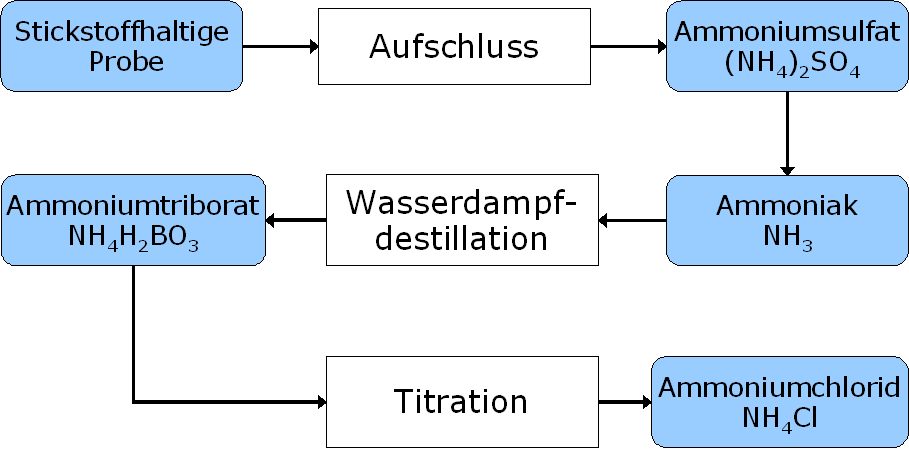 Schema des Kjeldahl-Aufschlusses